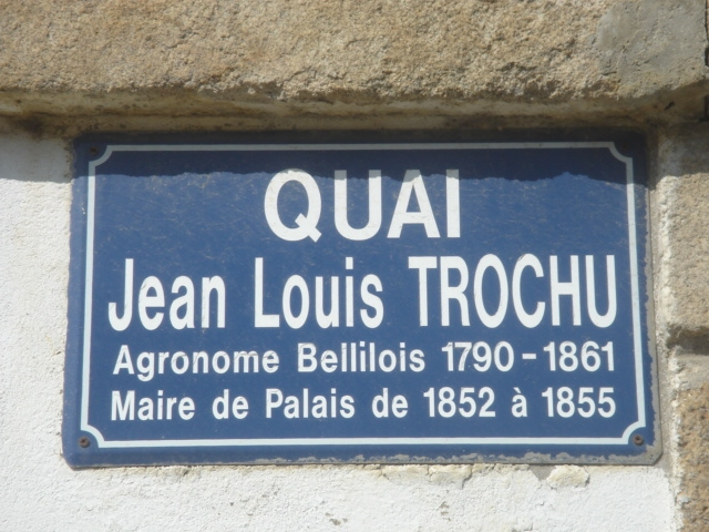 Plaque du quai Trochu à Palais à Belle-Île-en-Mer (56)